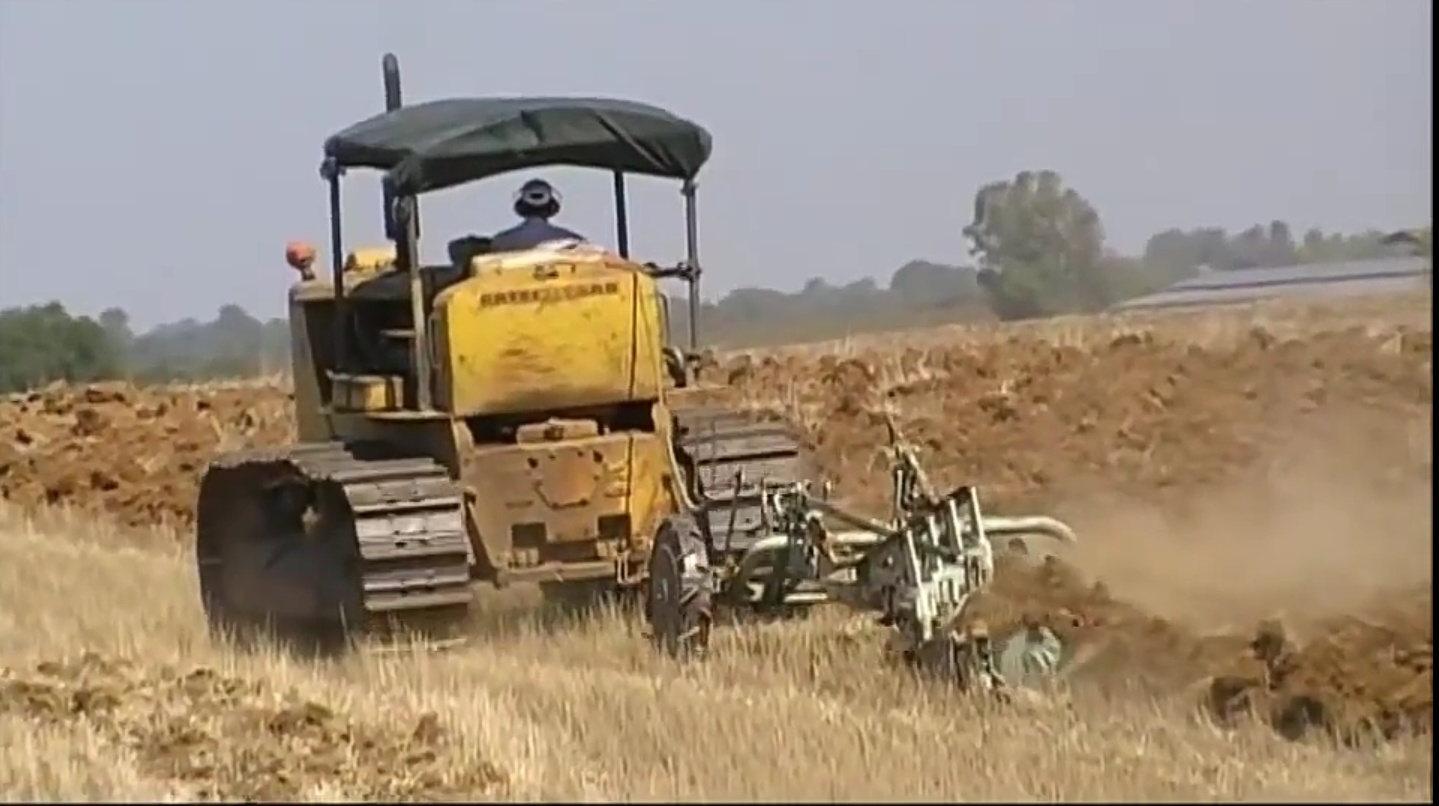 Aratura